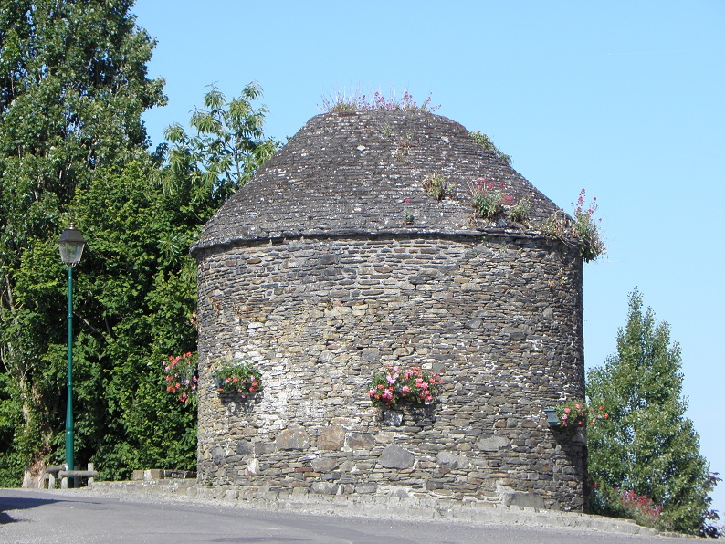 Colombier à Lillemer (35).